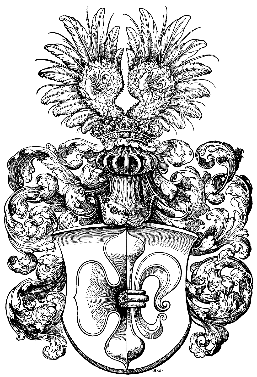 Wappen des Matthäus Lang. Maße: 31,9 × 21,5 cm, Technik: Holzschnitt